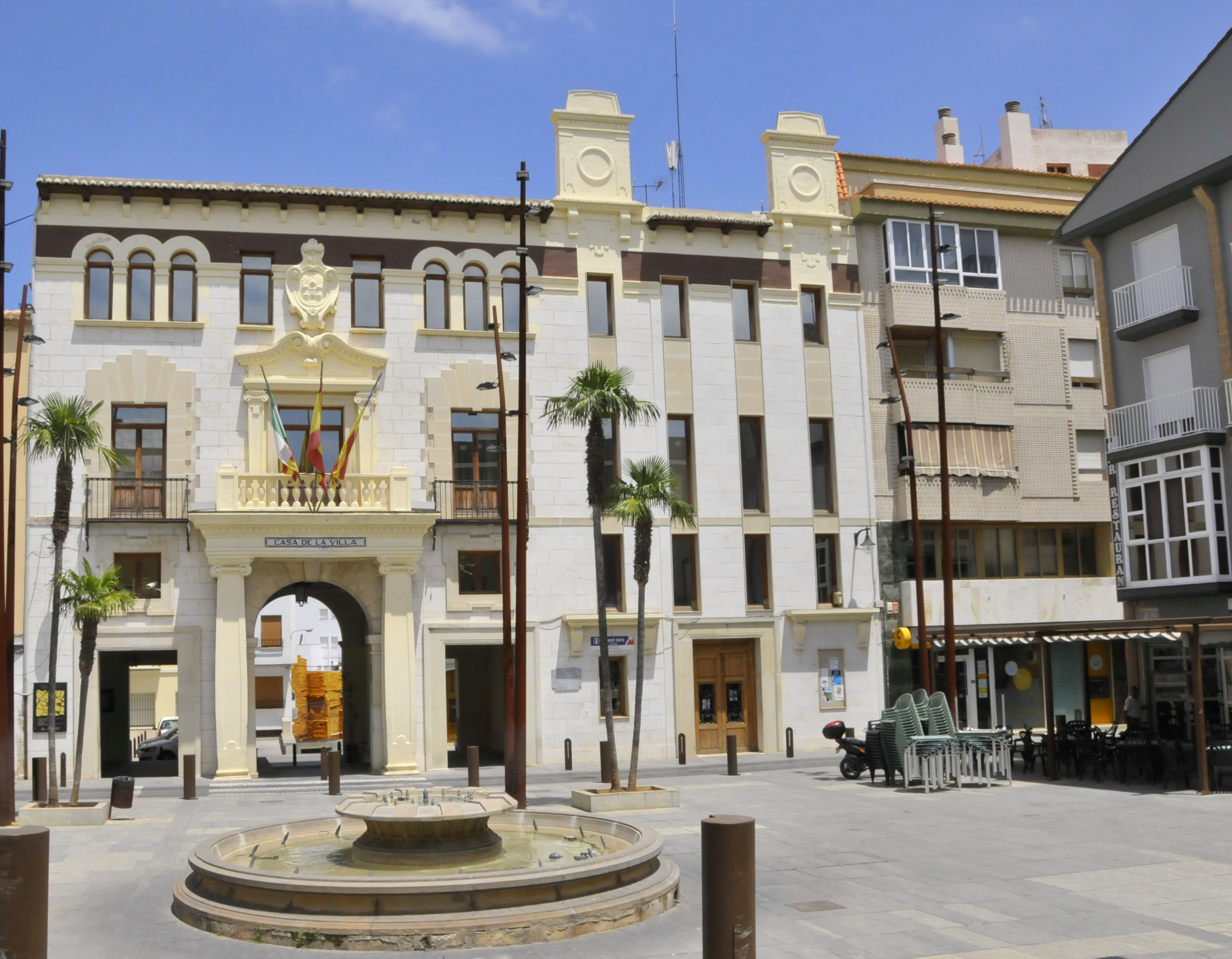 Pego, Rathaus